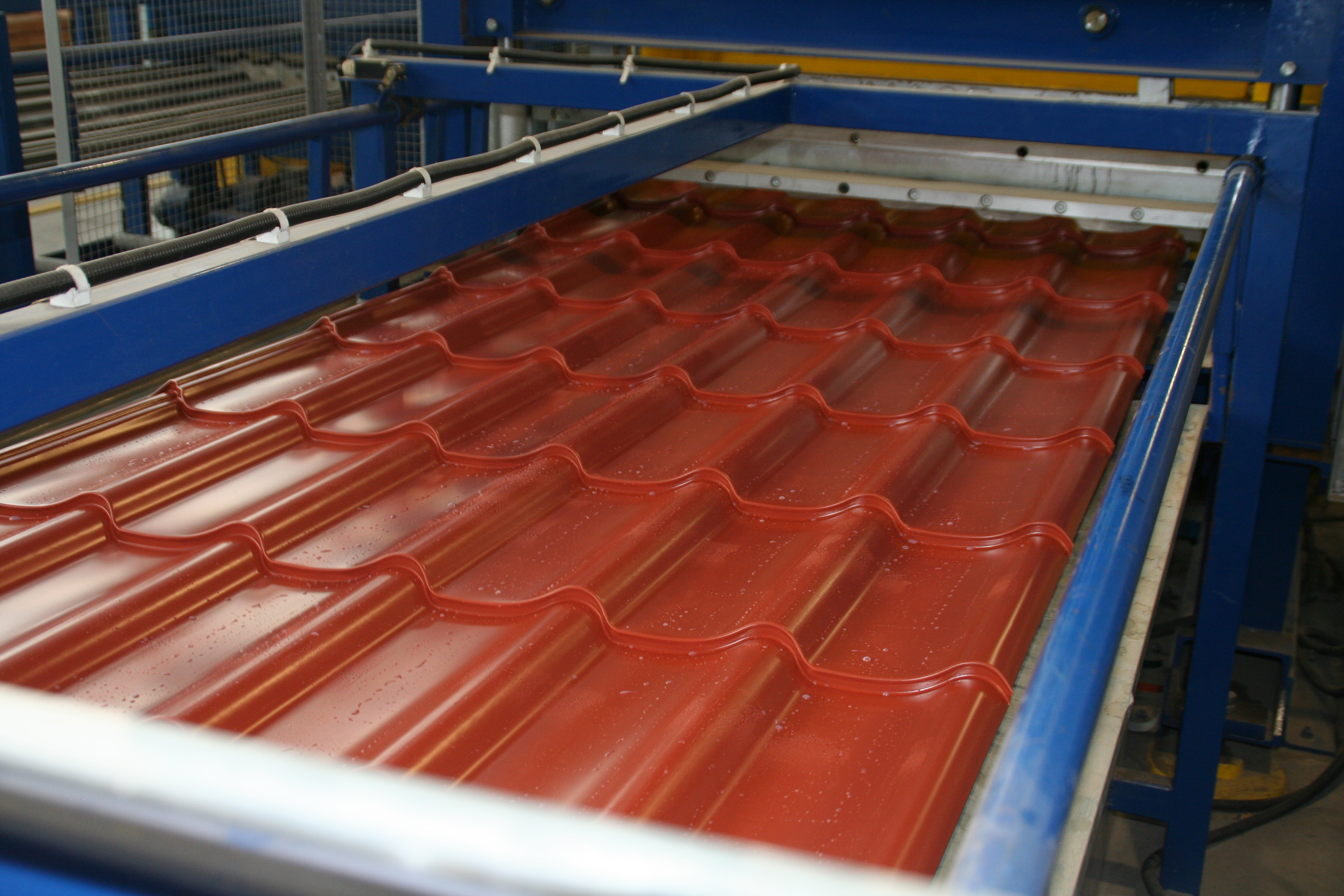 Dachpfannenprofil das aus der Rollformanlage kommt